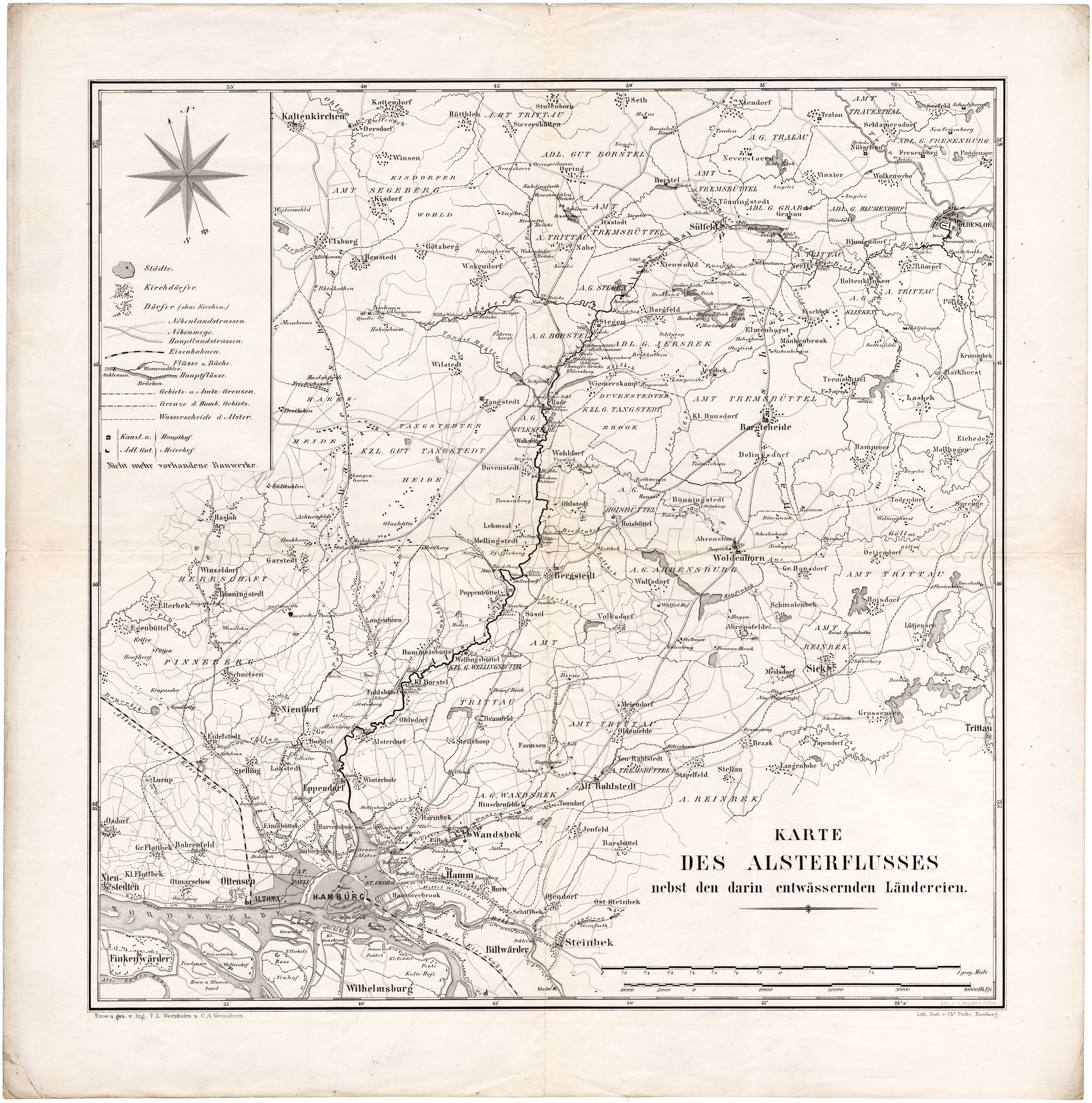 Karte des Alsterflusses nebst den darin entwässernden Ländereien: zum historischen Bericht über Hamburgs Rechte an die Alster